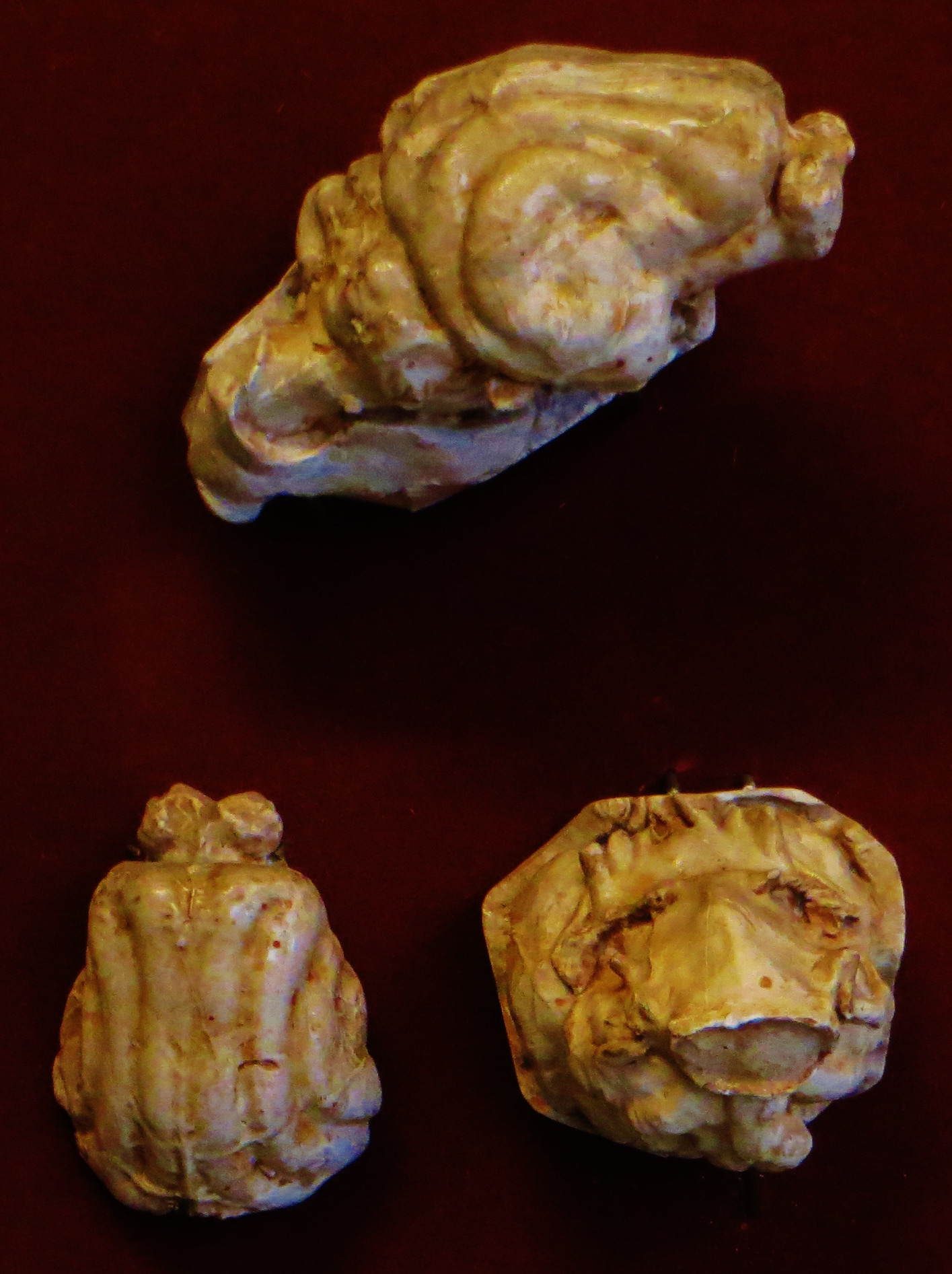 Fossil of Eusmilus, an extinct mammal- Took the photo at Musee d'Histoire Naturelle, Paris